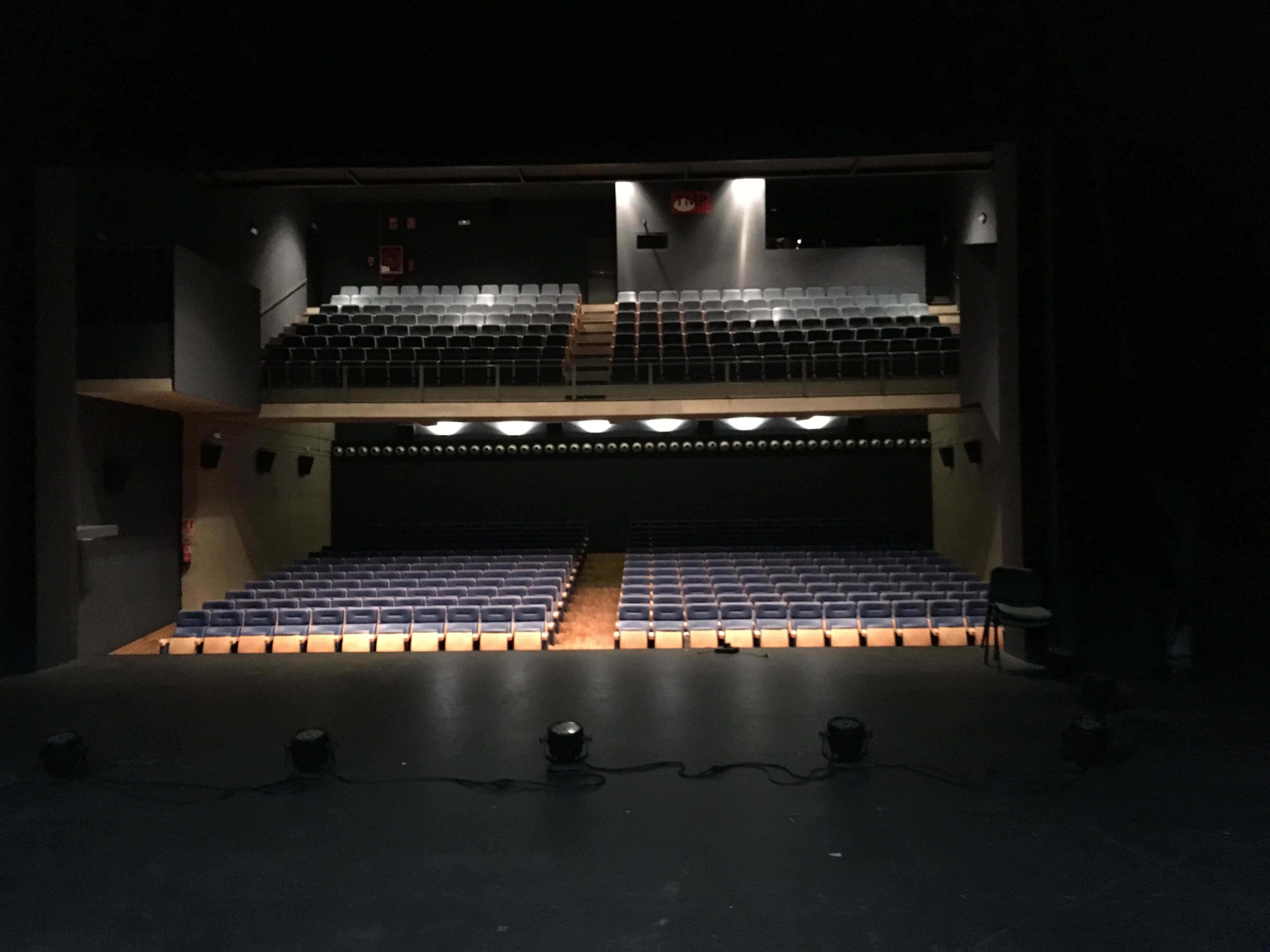 Programa especial Ràdio Capital 15 anys: Cultura · Territori · Ràdio, emès en directe des del Teatre Municipal de Palafrugell